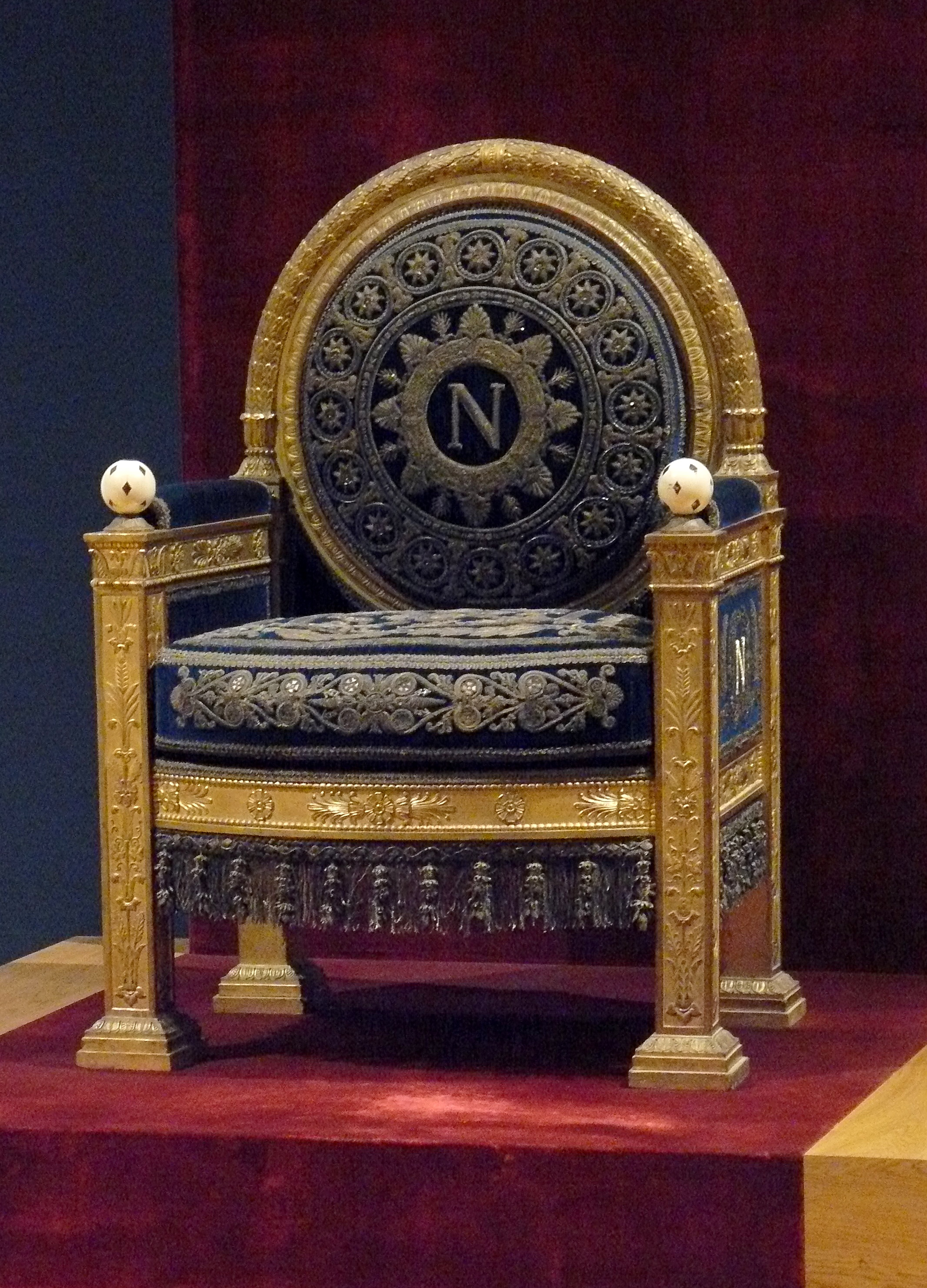 Trône de Napoléon Ier aux Tuileries - Jacob-Desmalter d'après un dessin de Percier et Fontaine - 1804 - Musée du Louvre, appartements de Napoléon III (dépôt du Musée national du Château de Fontainebleau) - Inv n° GMTC 2